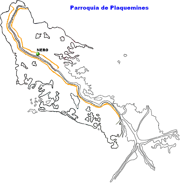 Nero, Louisiana.